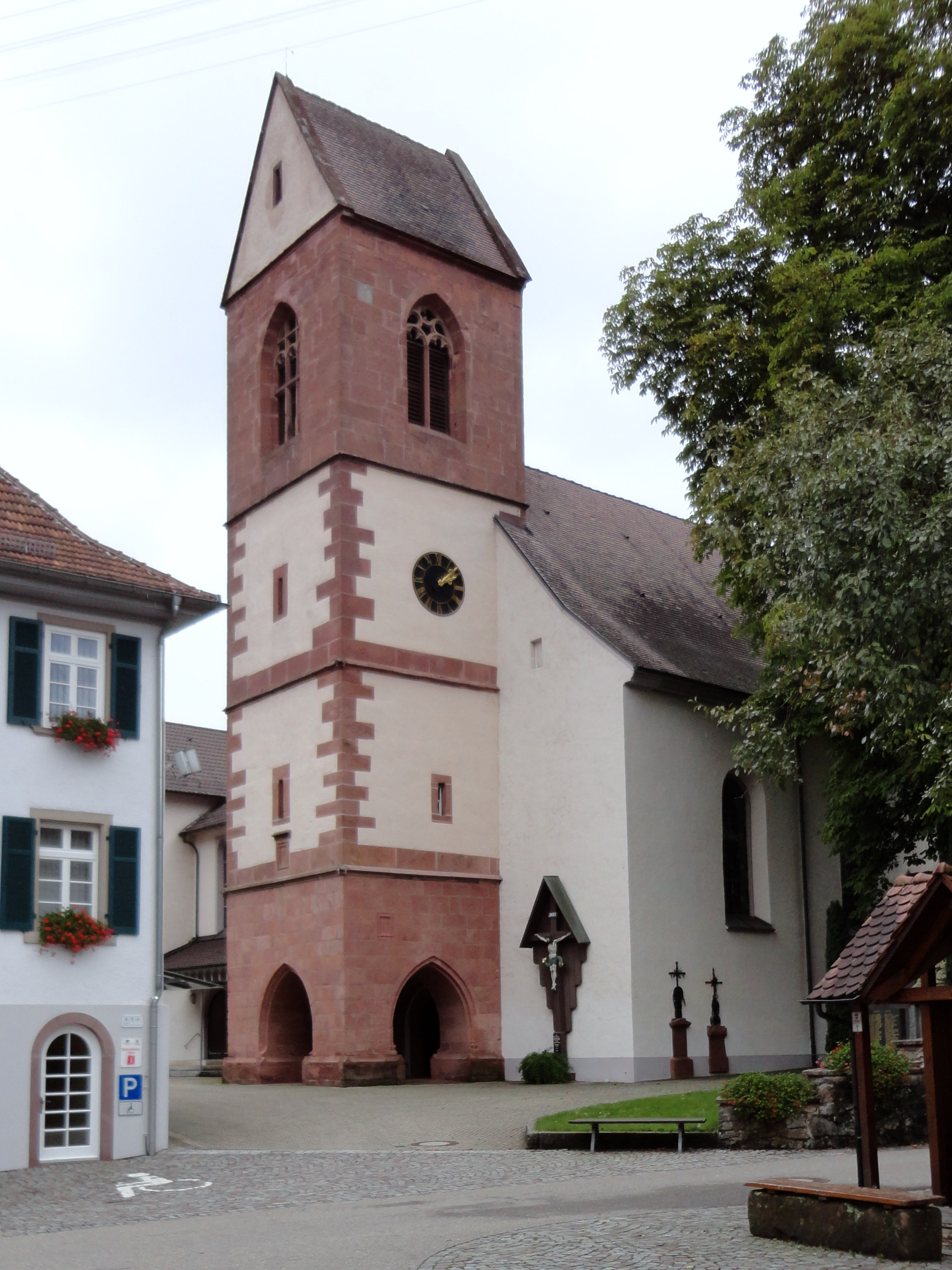 Katholische Kirche St. Afra in Mühlenbach (Schwarzwald)